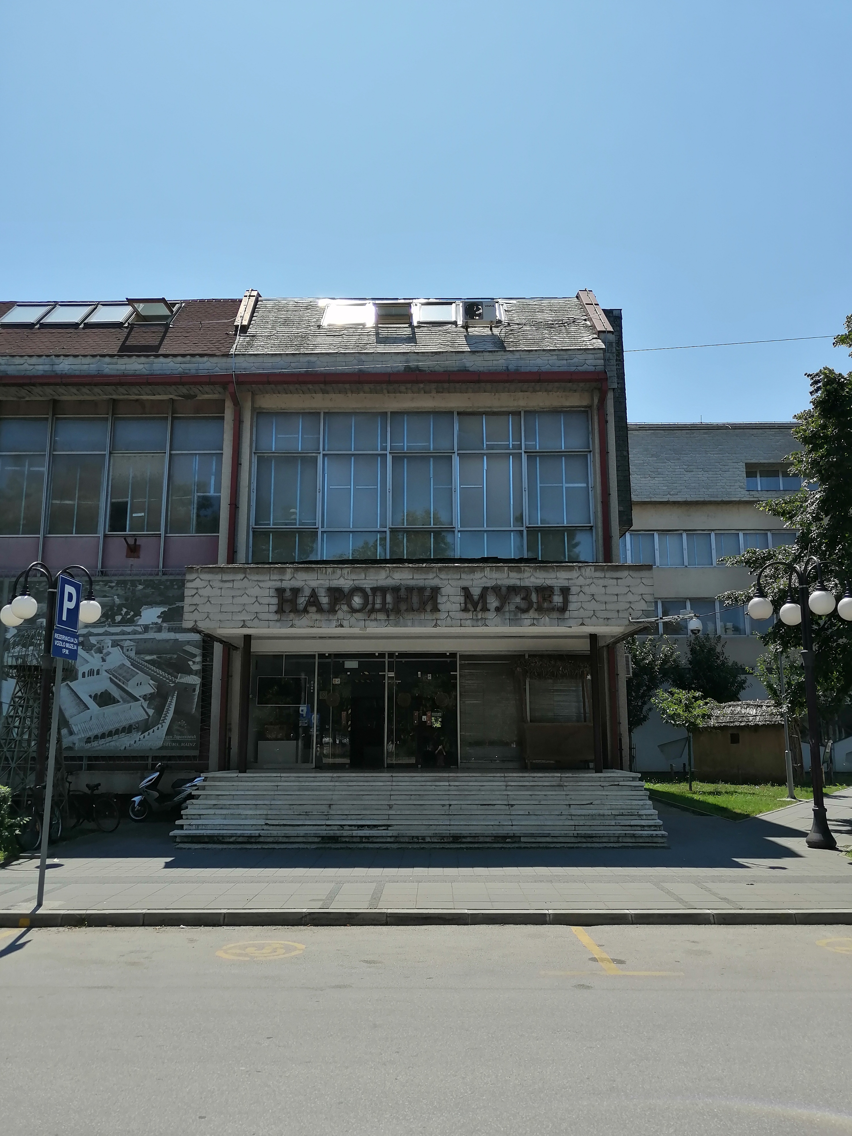 Srpski (latinica): Narodni muzej, Leskovac